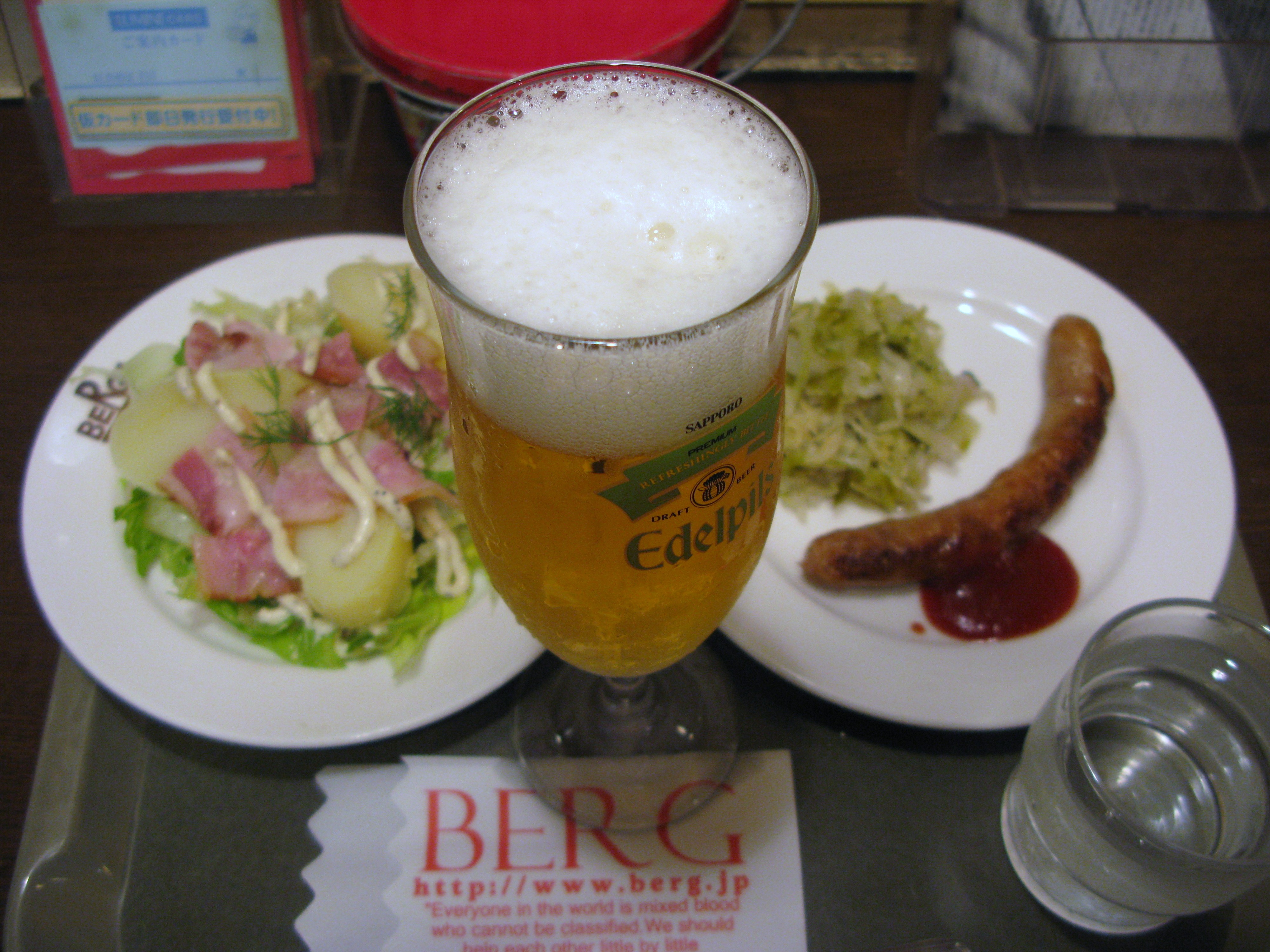 サッポロエーデルピルスとつまみ（東京・新宿区新宿3-38-1、新宿駅東口改札最寄りの「ビア&カフェBERG」[1]）